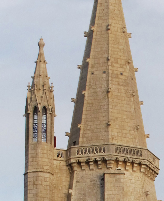 La lanterne de la Tour de la Lanterne, La Rochelle, France